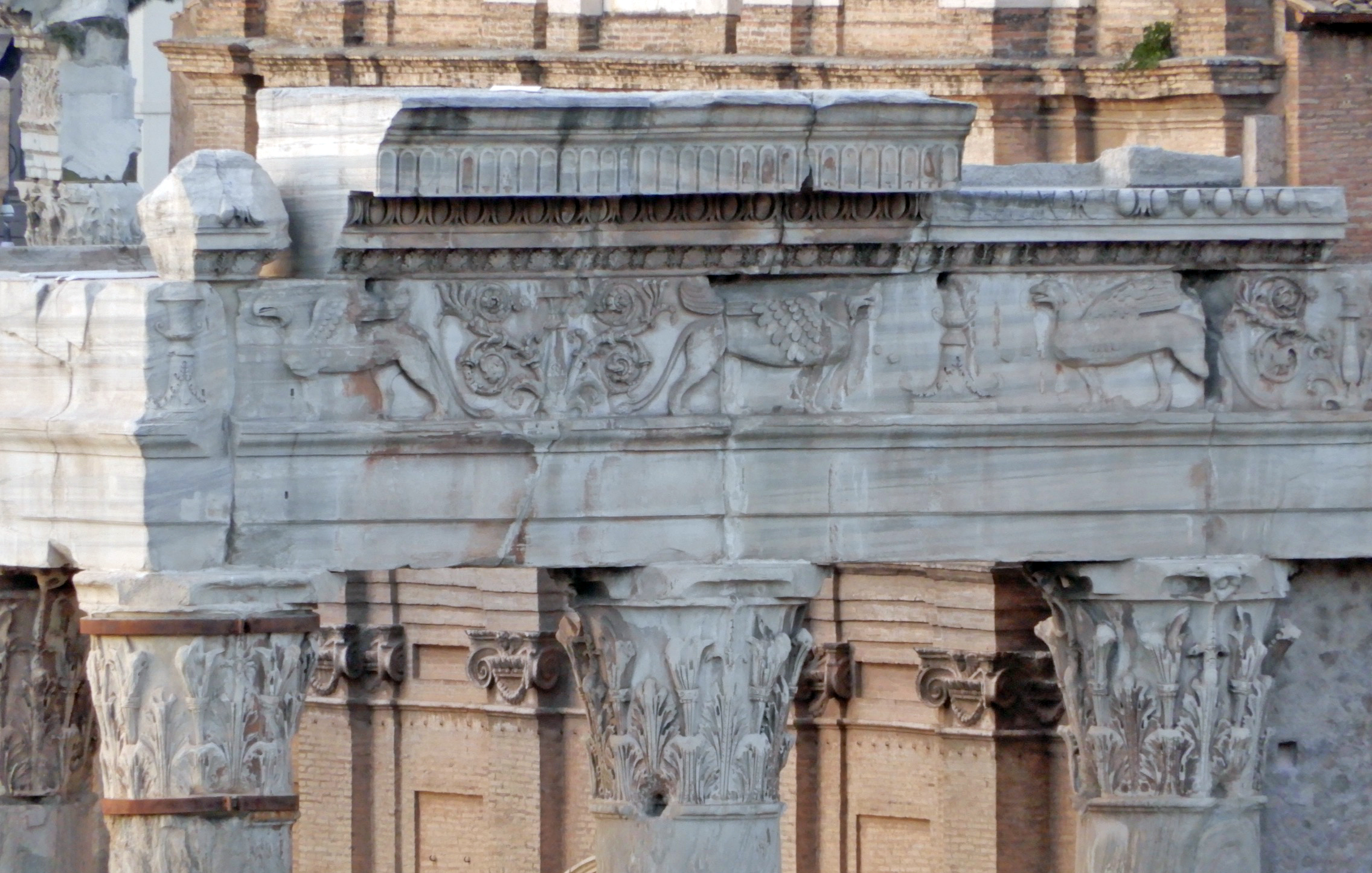 Roma, Foro Romano, tempio di Antonino e Faustina, trabeazione e capitelli, lato destro del pronao